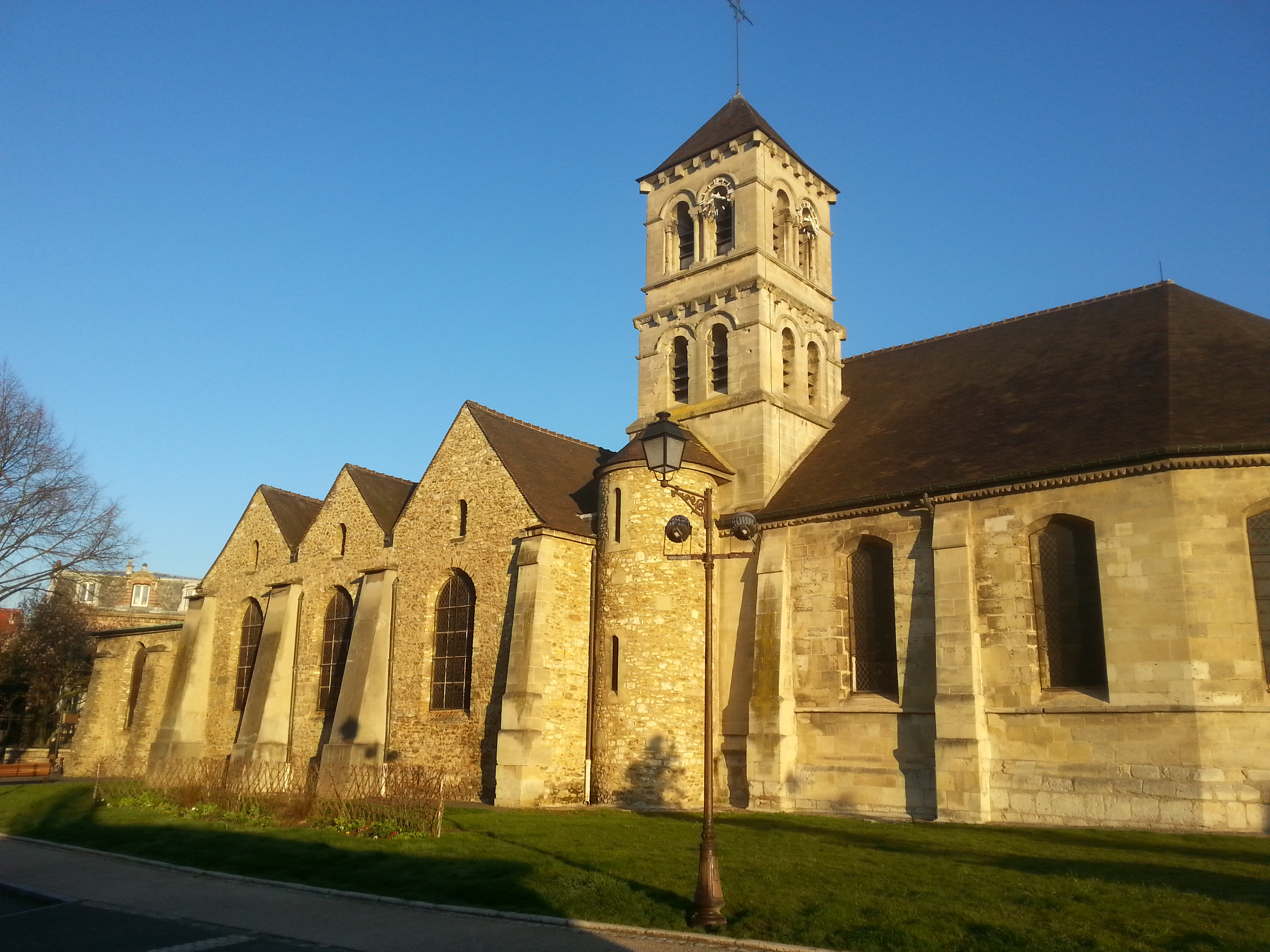 Vue de la Mairie de Deuil-La Barre